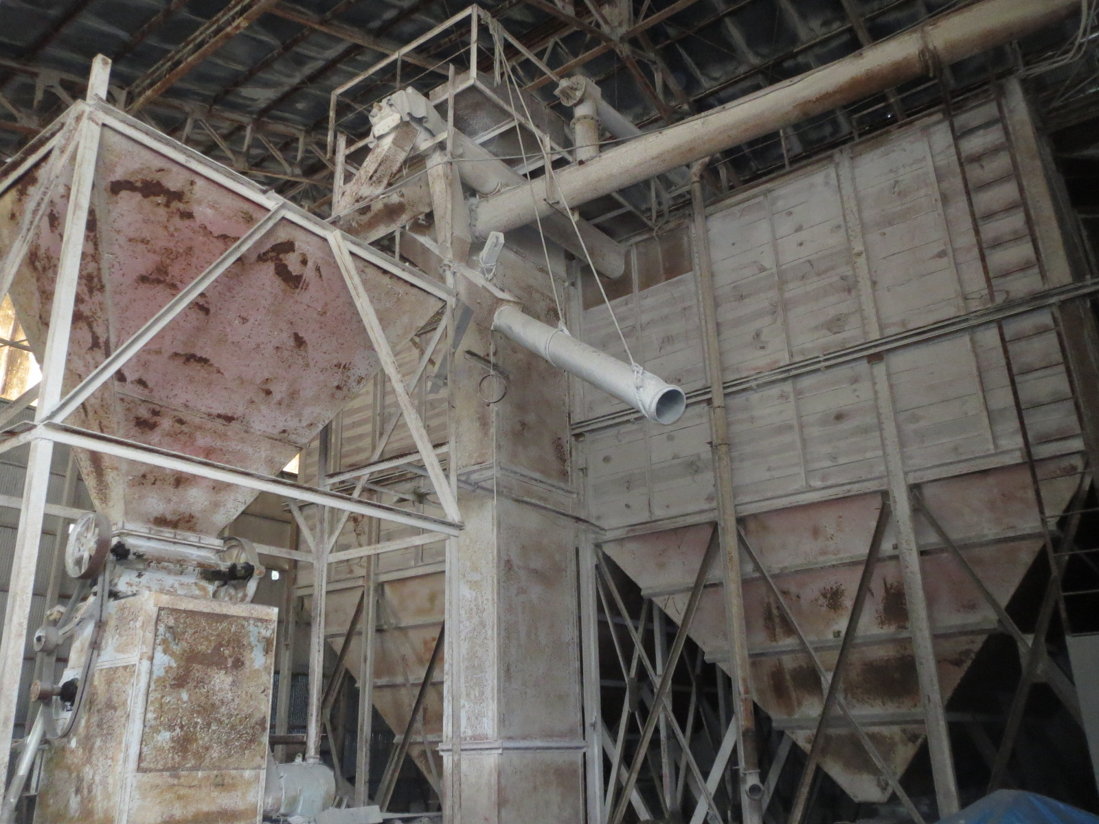 旧東北砕石工場の内部